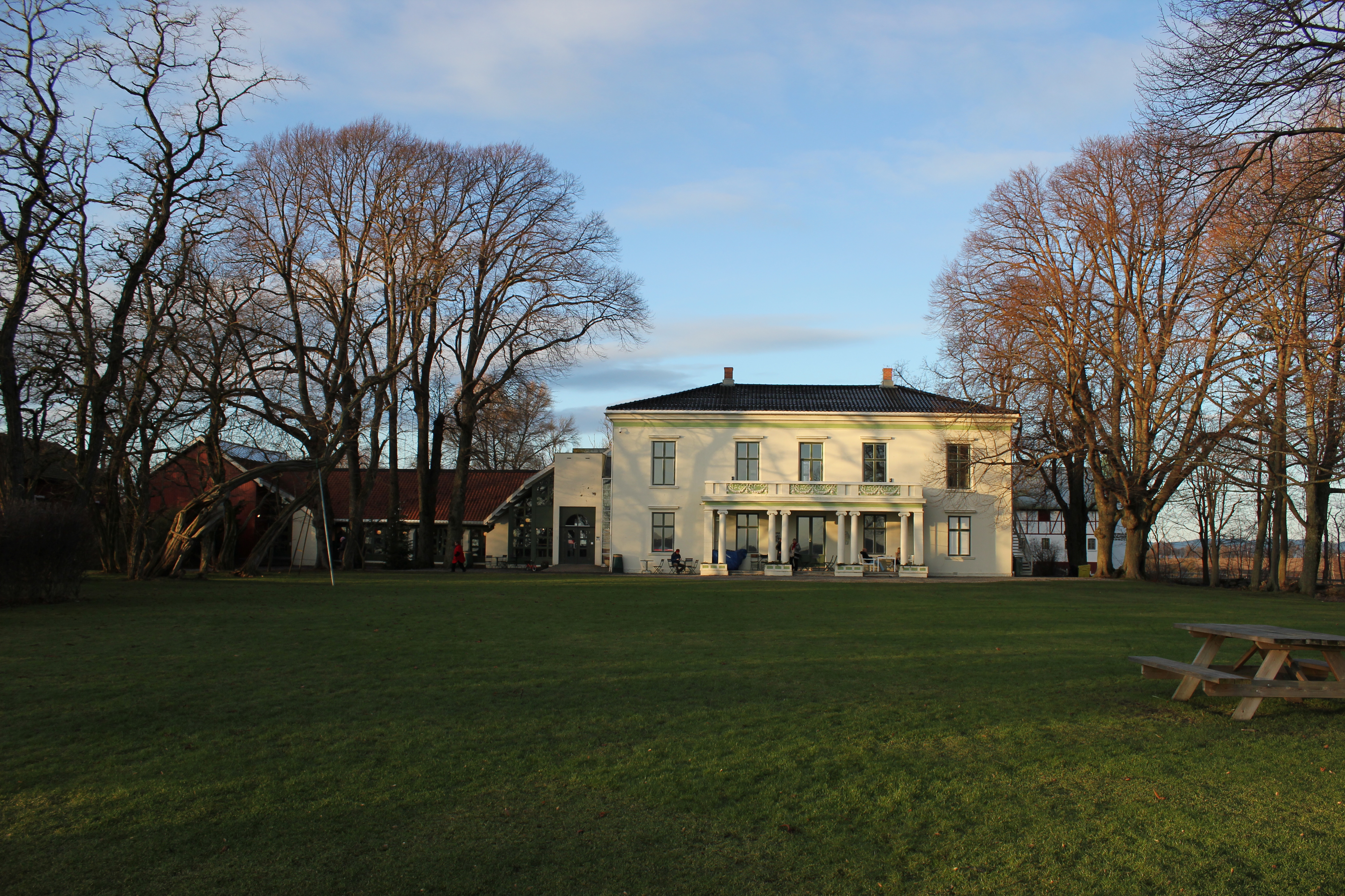 Hovedbygningen på Galleri F15 på Alby, Jeløy